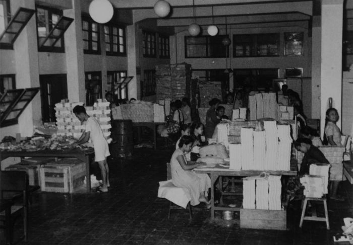 Foto. Het vouwen van drukwerk in drukkerij de Unie. Het vouwen van drukwerk bij het kantoor van de Java Bode